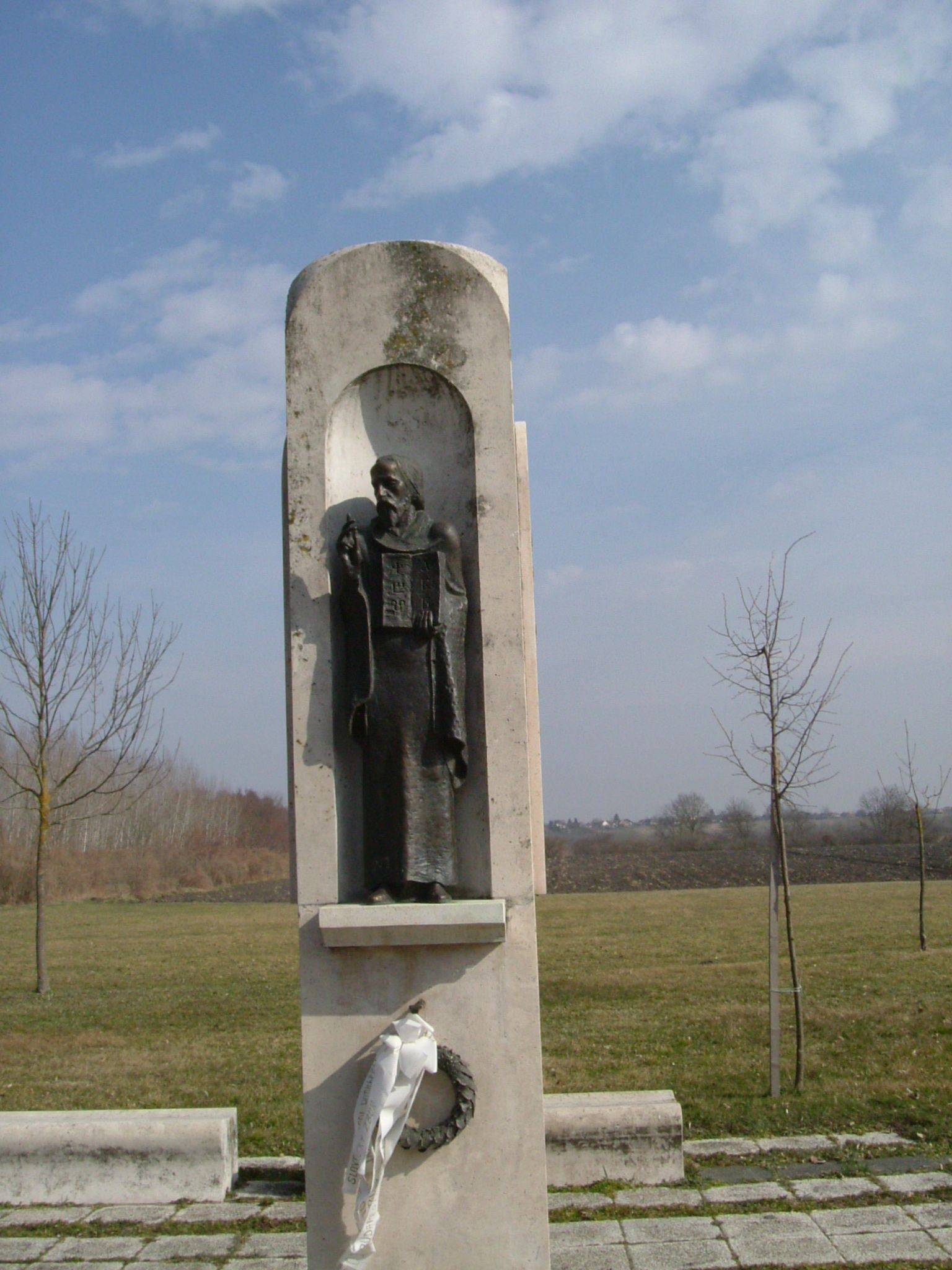 Zalavár - Hungary. Cyril - Methodius memorial